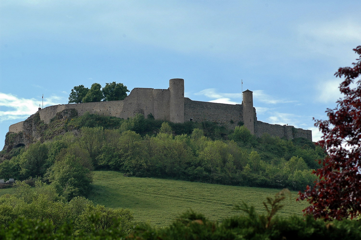 face médiévale du château de Sévérac-le-Château (Aveyron)